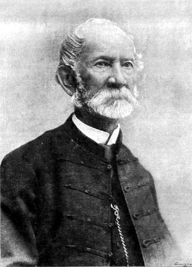 Irányi Dániel (1822–1892) politikus, publicista, történetíró portréja. Ellinger Ede fényképfelvétele